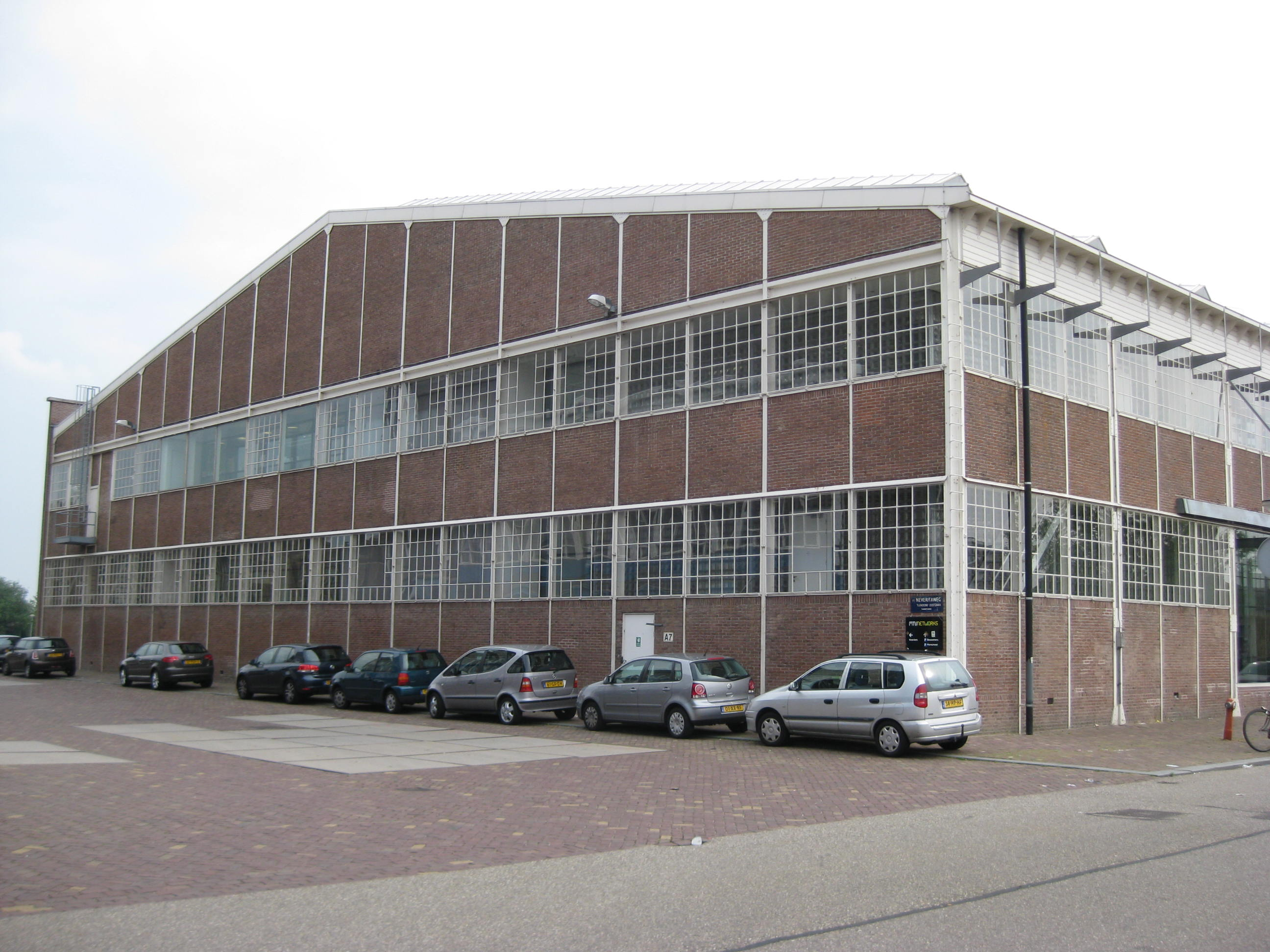 Timmerwerkplaats NDSM tt Neveritaweg 6 Amsterdam-Noord